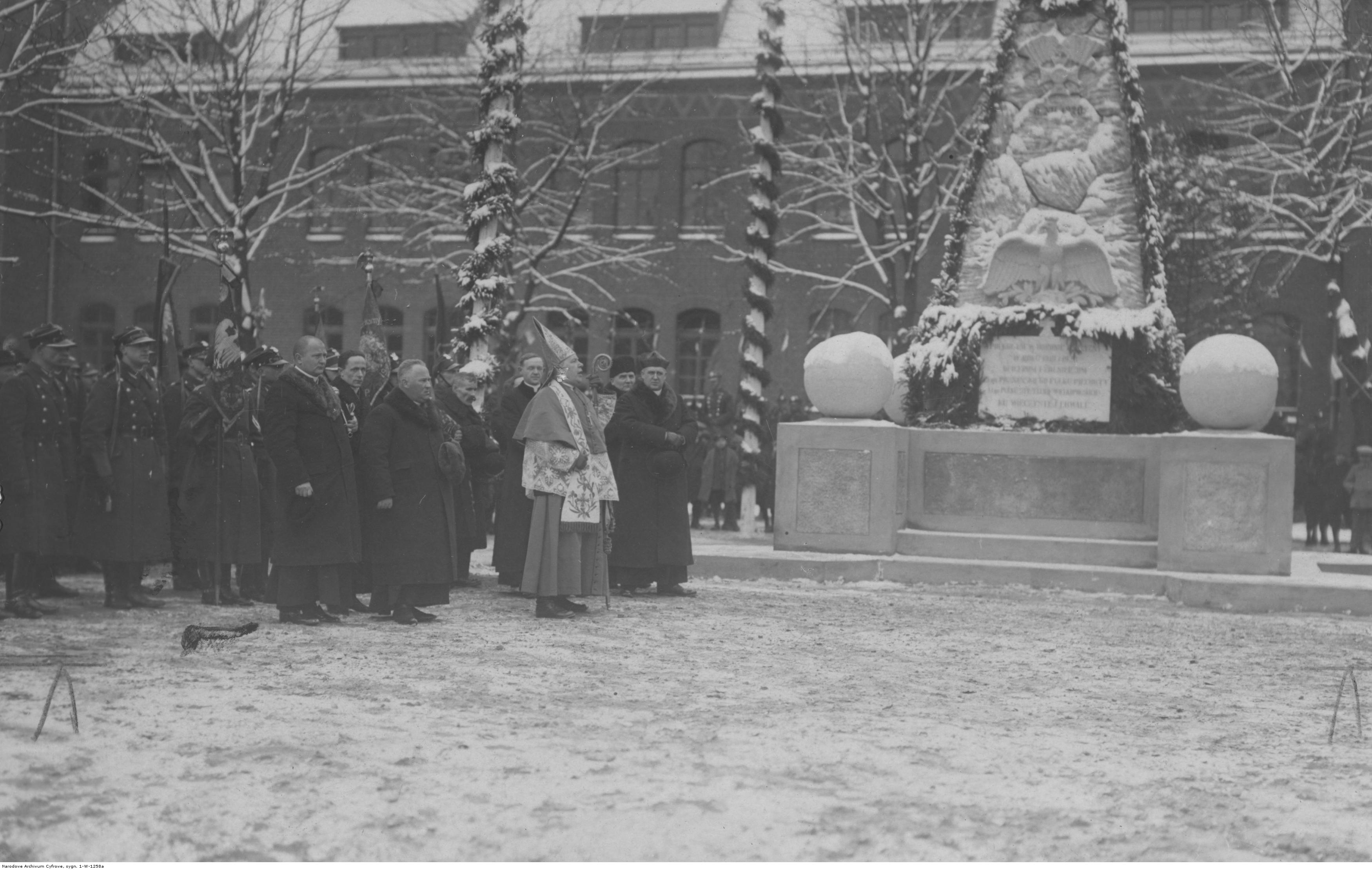 Odsłonięcie pomnika poległych żołnierzy 55 pułku piechoty w Lesznie; 1928. Bp polowy Stanisław Gall w otoczeniu wojskowych i władz podczas przemówienia przed pomnikiem. Koncern Ilustrowany Kurier Codzienny - Archiwum Ilustracji. Sygnatura: 1-W-1258a